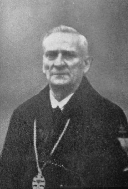 Ferdinand Stibor (1869 - 1956), Český římskokatolický reformistický kněz.